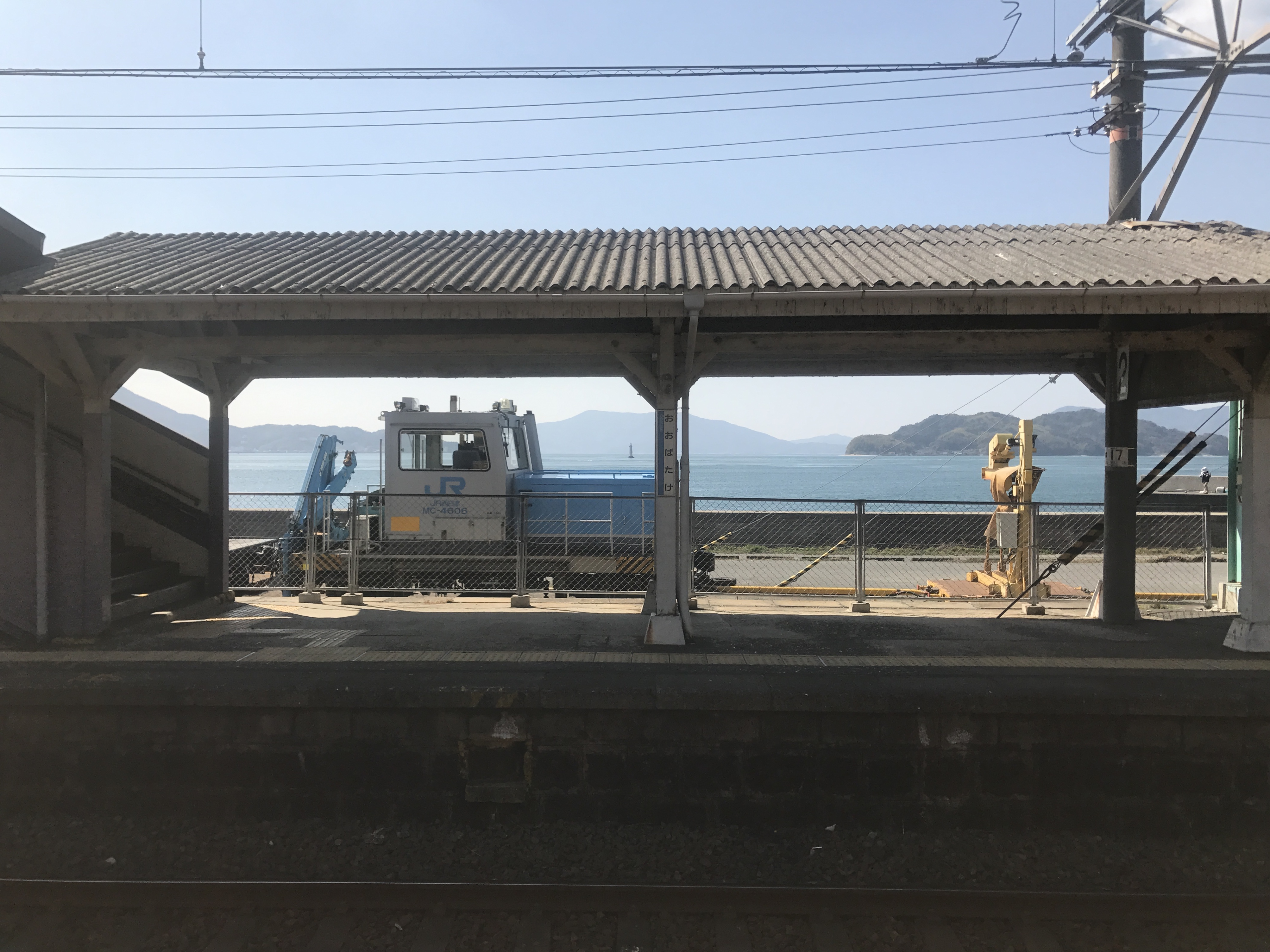 山陽本線列車内より望む大畠駅のホーム。背後に周防大島と笠佐島が見える